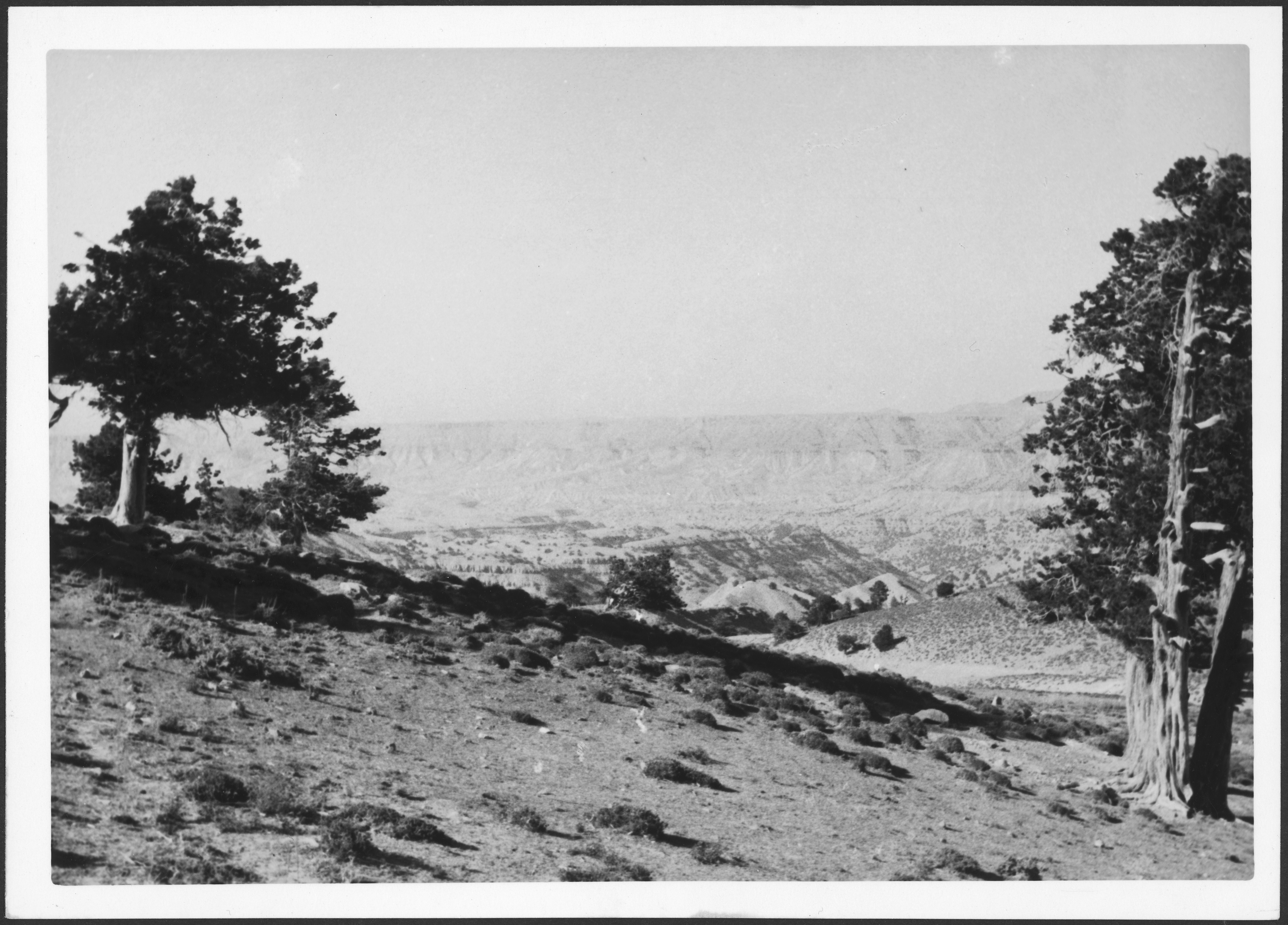 Afghanistan, Sauzak Pass (Zarmast Pass): Landschaft; Blick auf Gebirge